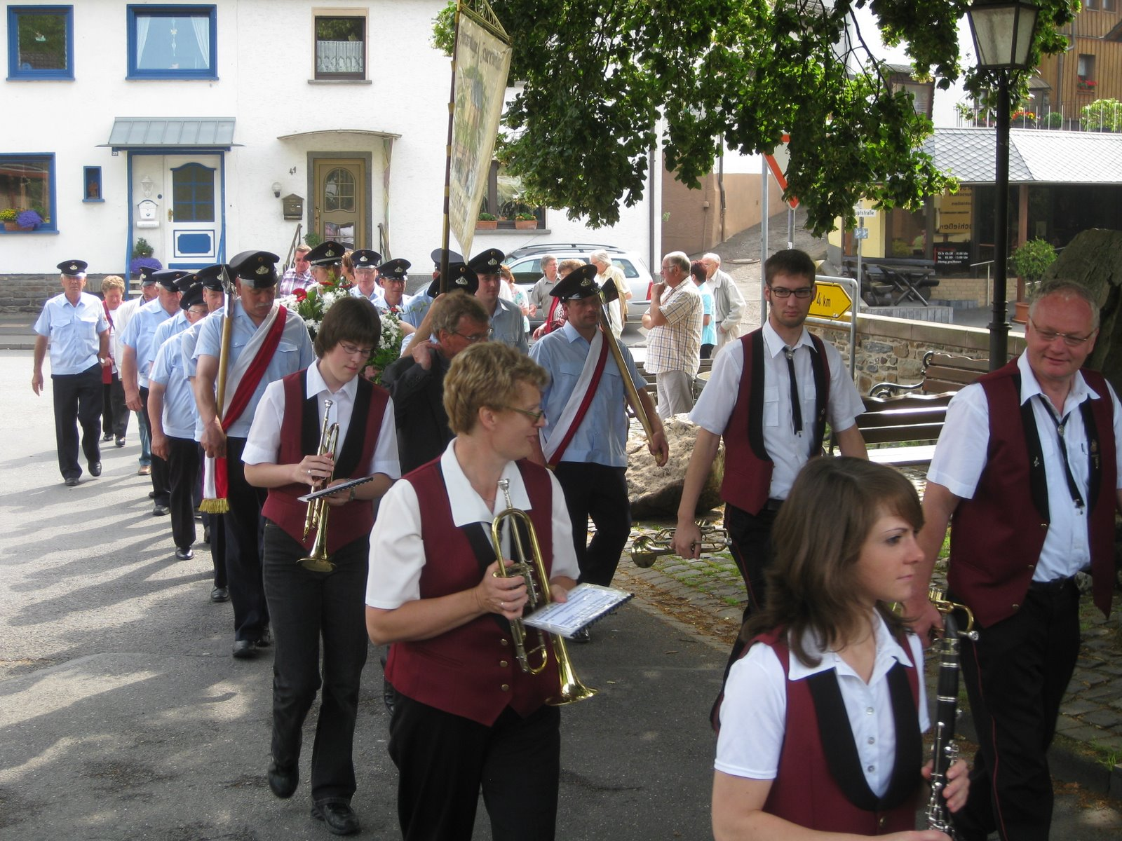 Dorfkirmes in Ahrbrück Ortsteil Brück